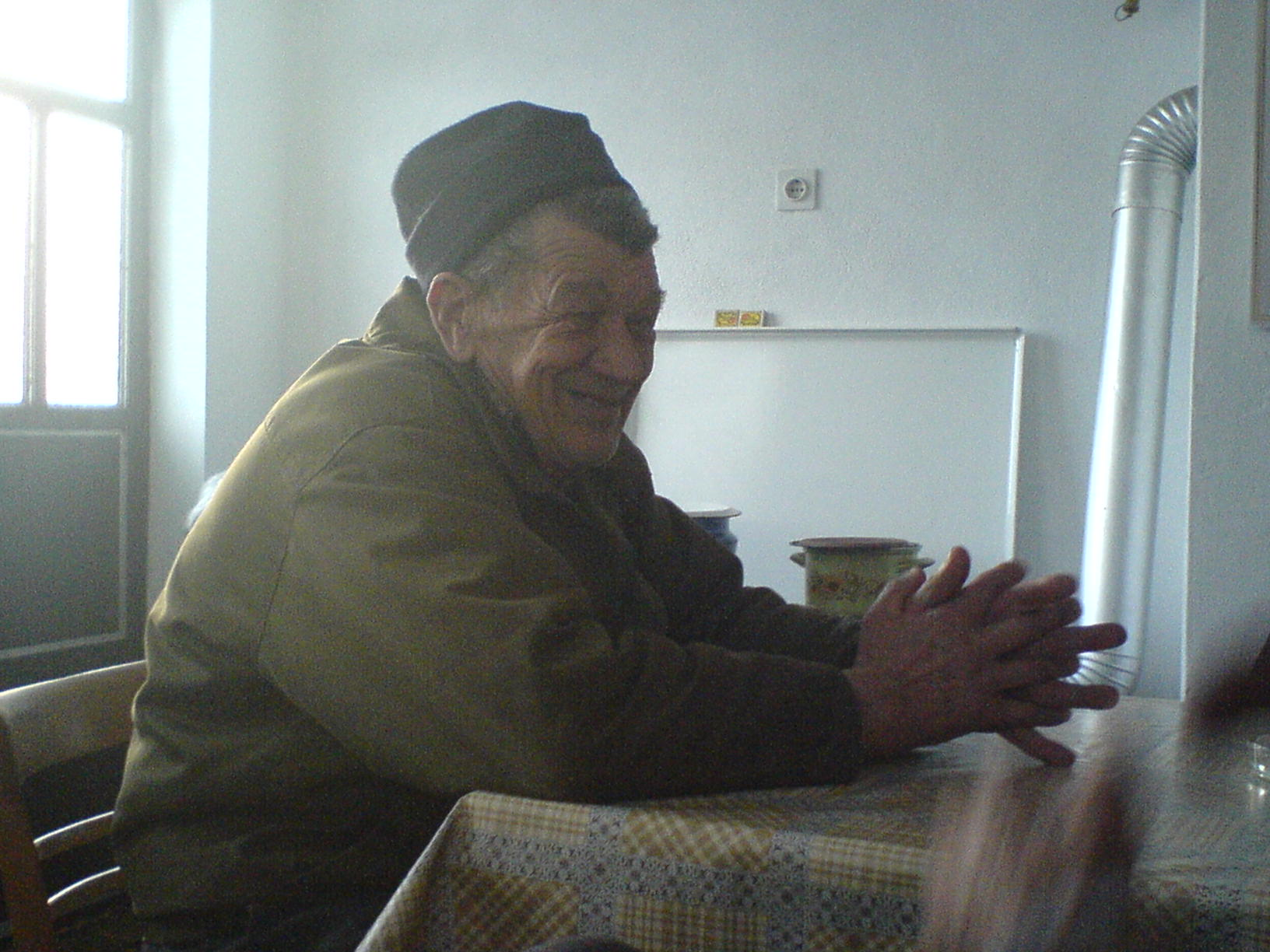 Станиша Маркељић, познатији као Немац, као мали је имао високу температуру, али га родитељи нису водили код лекара, па је остао глувонем. Био је изврстан зидар, а пре свега добар човек. Оно што ћу увек памтити је да је Таково звао Саново, а ја сам га као мали звао "апа-тапа".